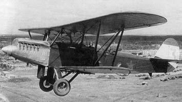 Р-5 в полете.